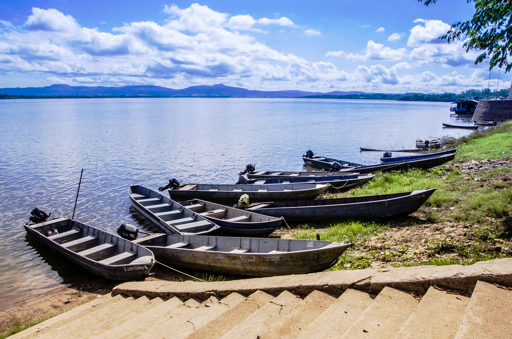 Barcos na beira do Rio Araguaia-TO